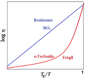 Gráfica de tipo "Austen-Angel" para la clasificación de los materiales según la evolución de la viscosidad entorno a la temperatura de transición vítrea.